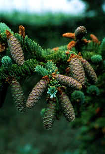 White Spruce Picea glauca